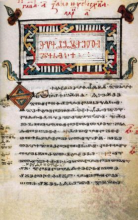 Зографско четвероевангелие - 10-11 век.